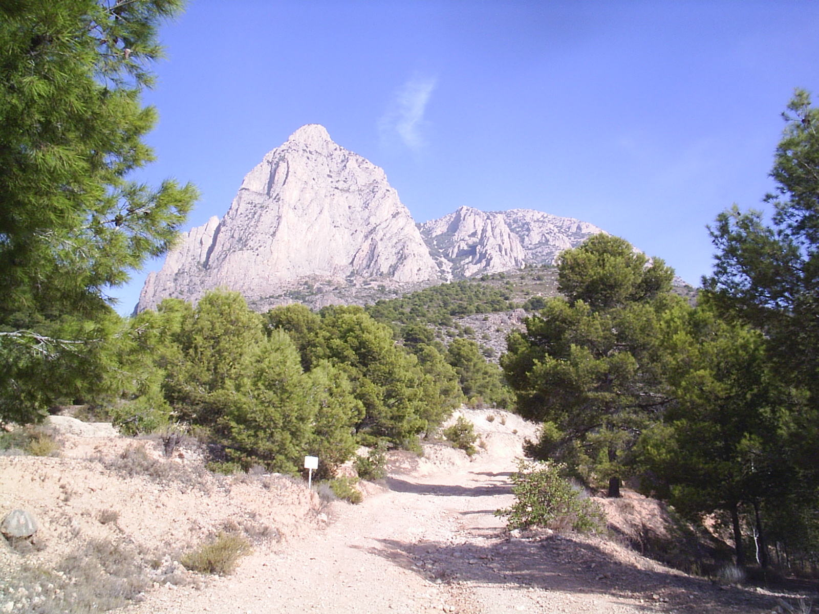 Puig Campana visto desde su cara sur, junto a la Font del Molí (Finestrat).